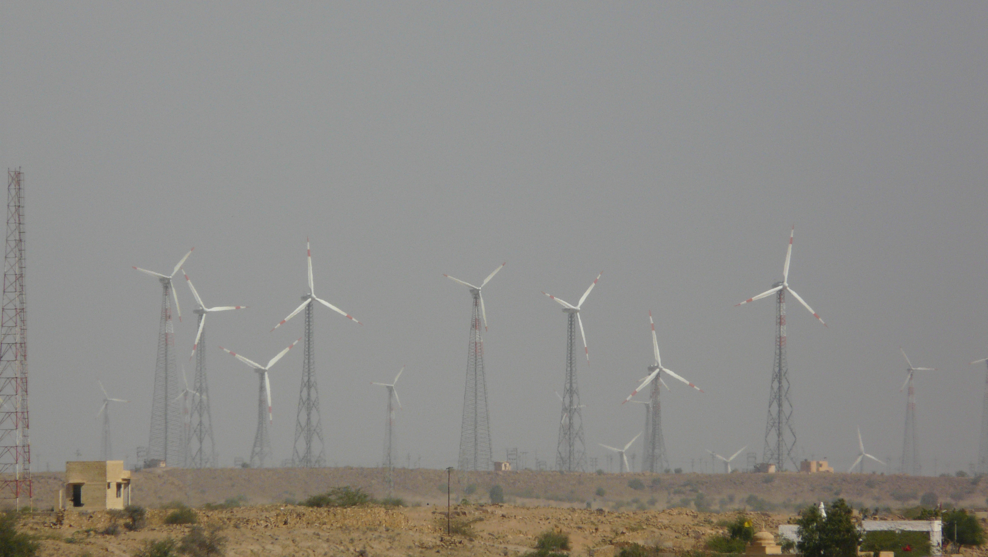 Wind Turbine Farms